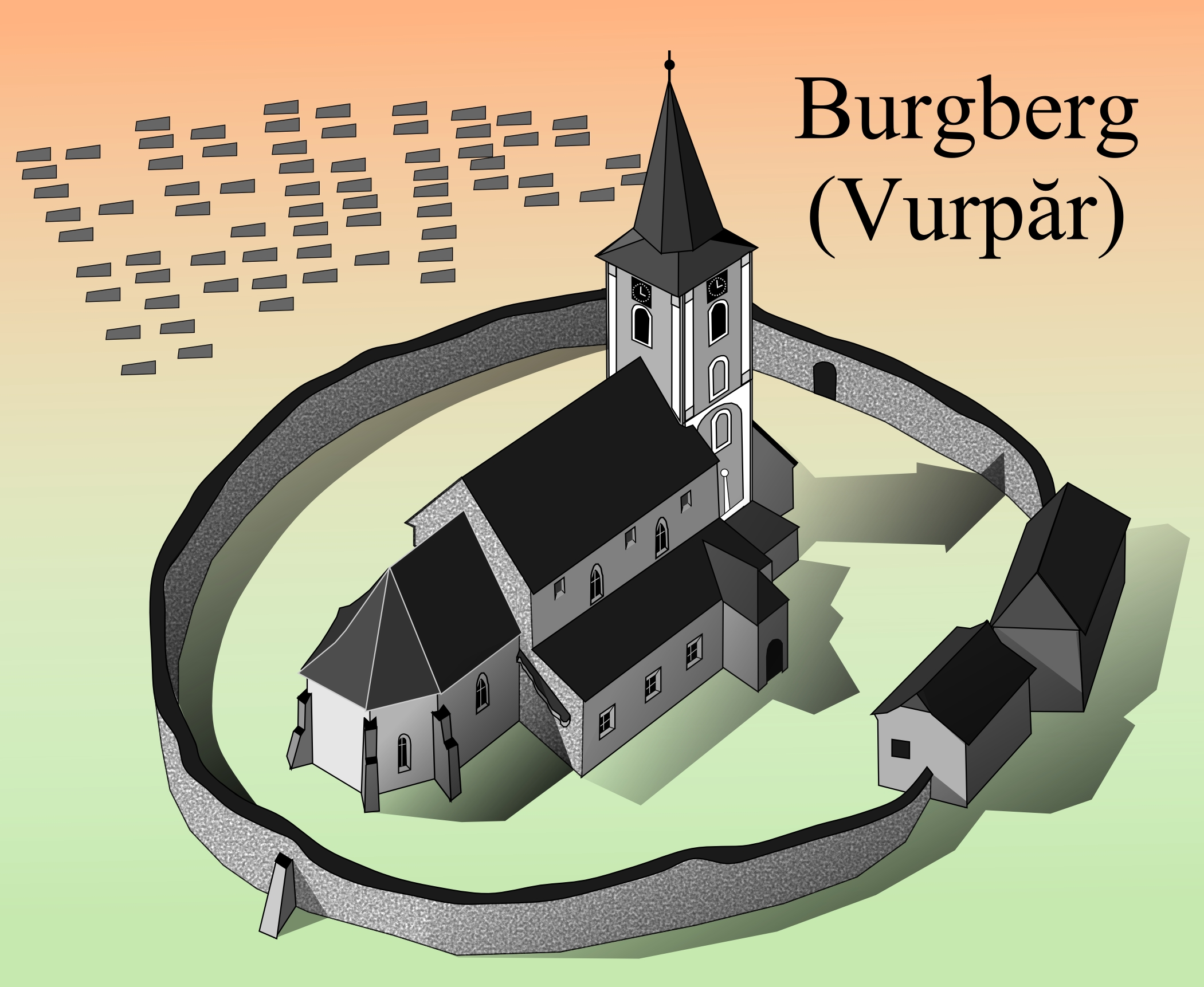 Biserica fortificata din Vurpar.